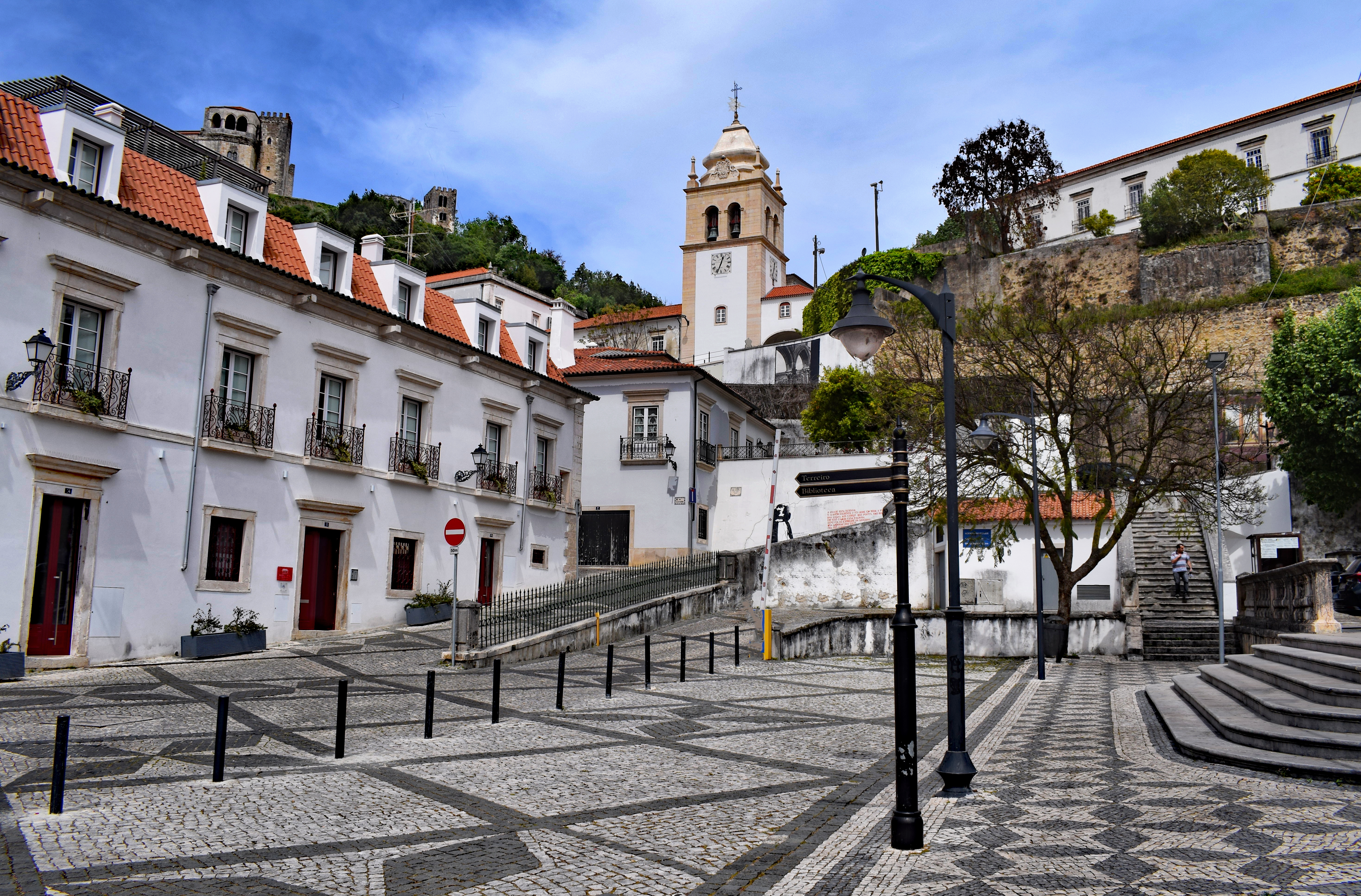 Leiria